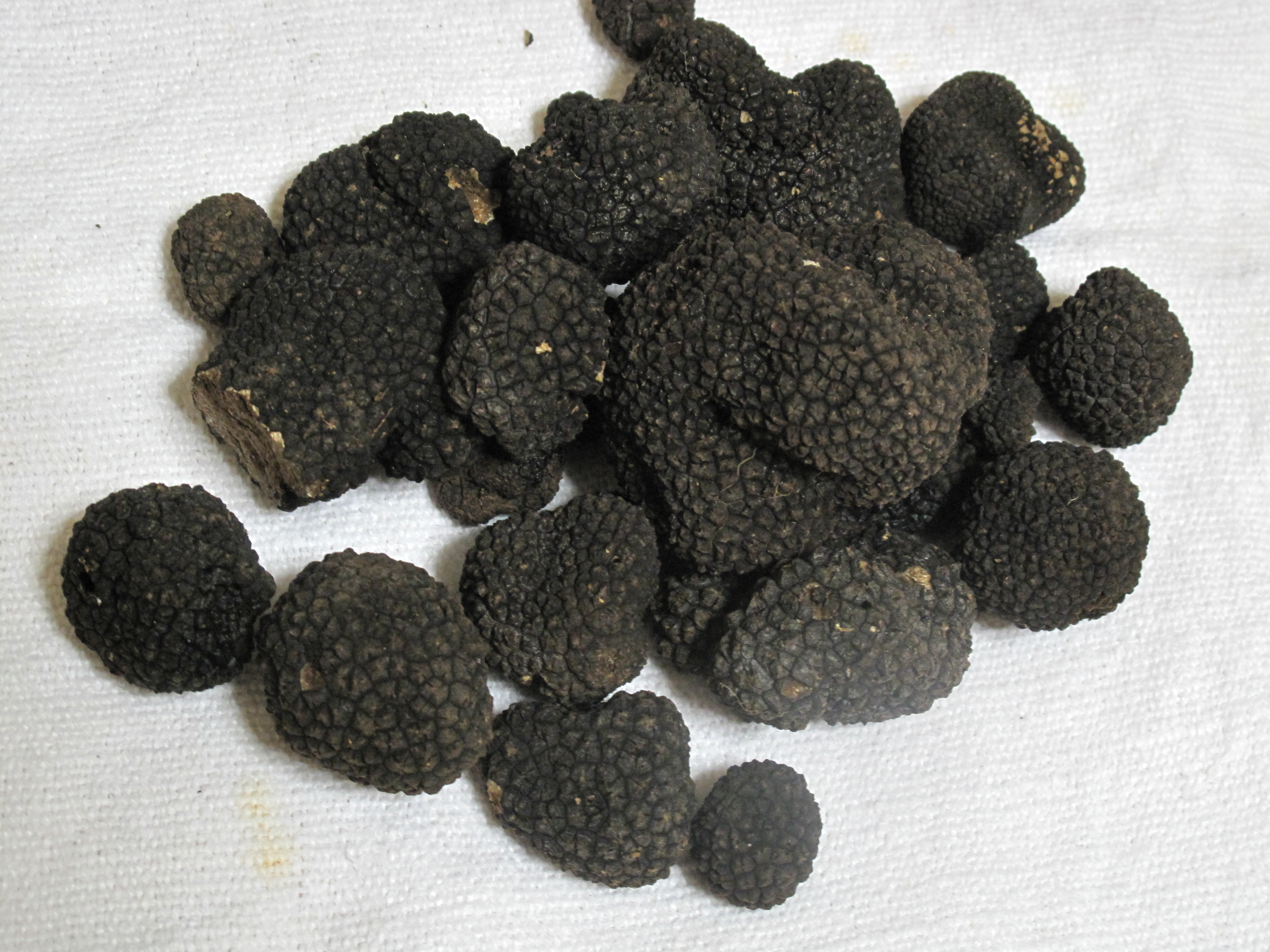 Tartufi neri estivi trovati in Valnerina il 17-07-2010